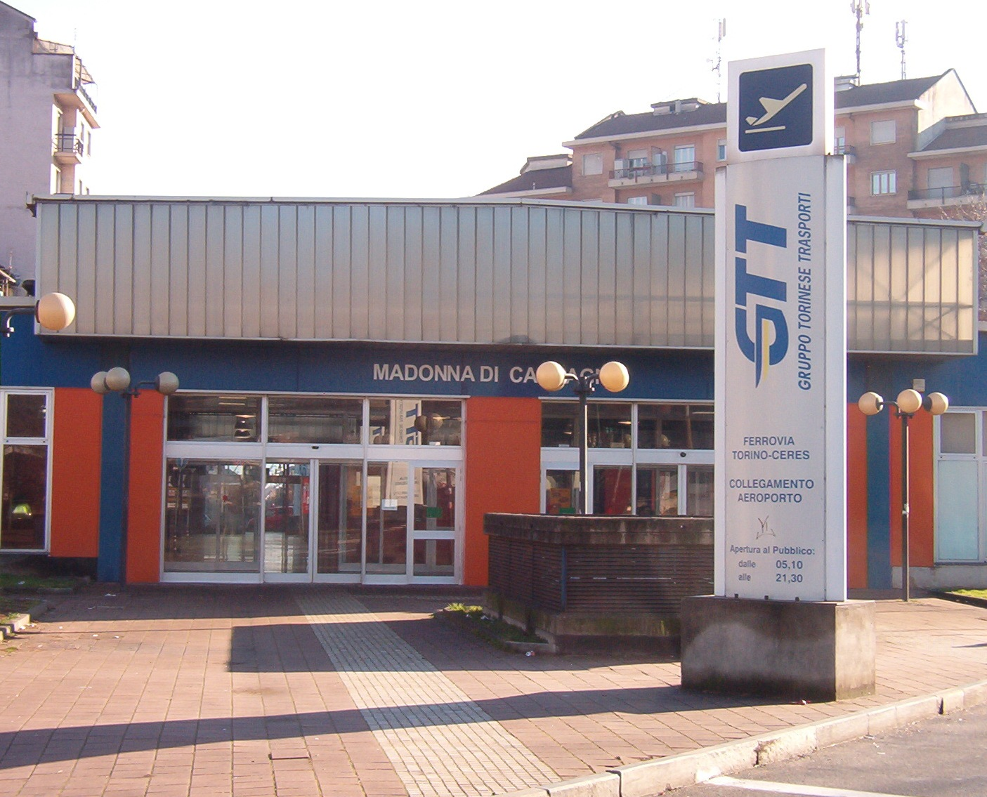 Stazione ferroviaria Madonna di Campagna - Torino - Italy